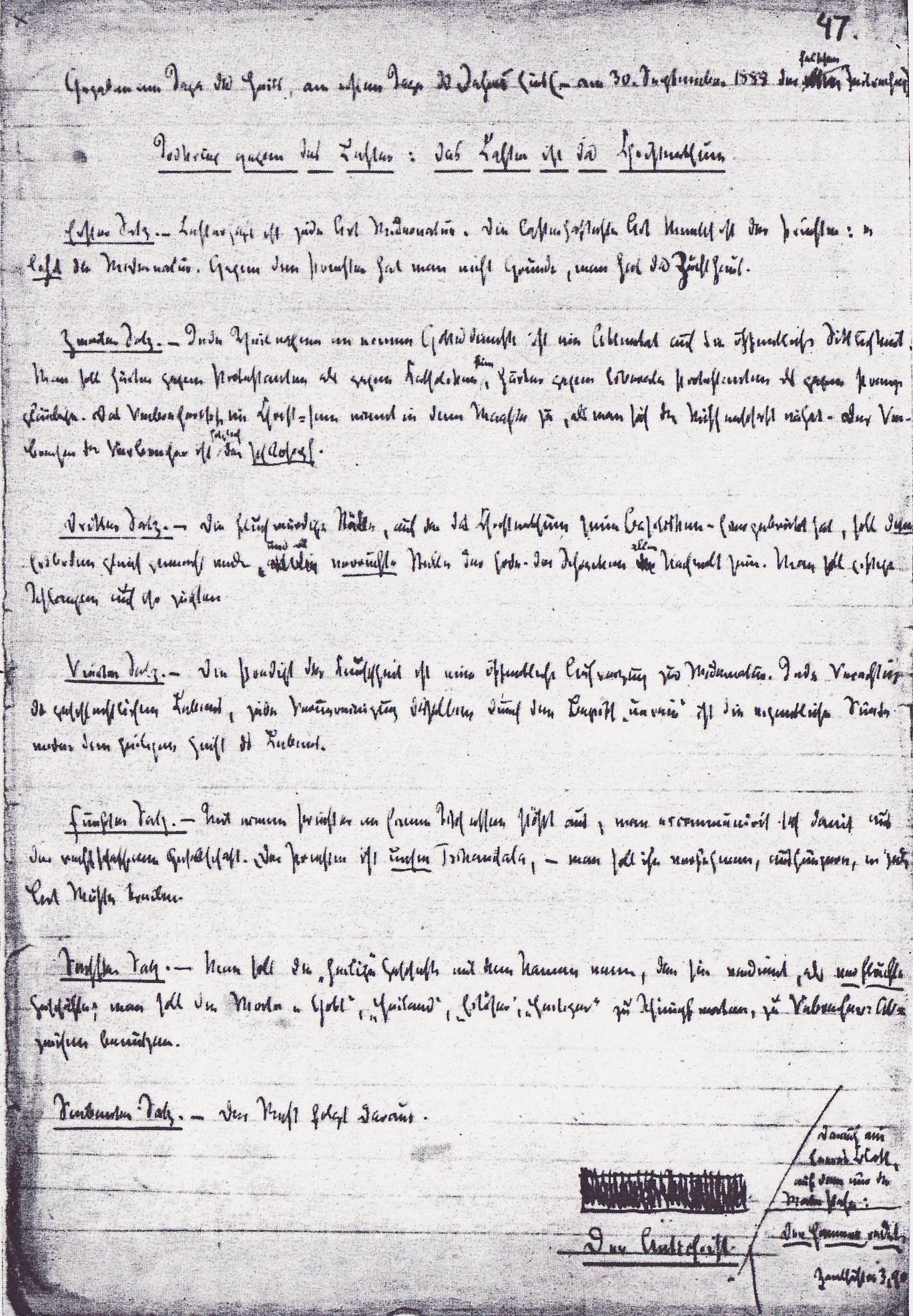 Friedrich Nietzsche's Gesetz wider das Christenthum, perhaps intended as ending of Der Antichrist